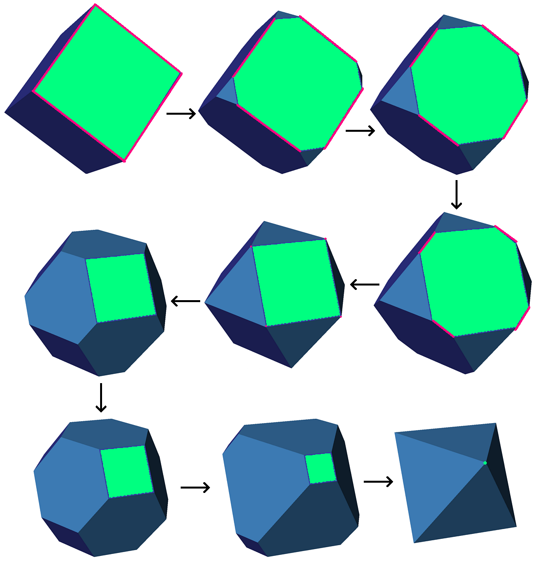 Durektigo de kubo